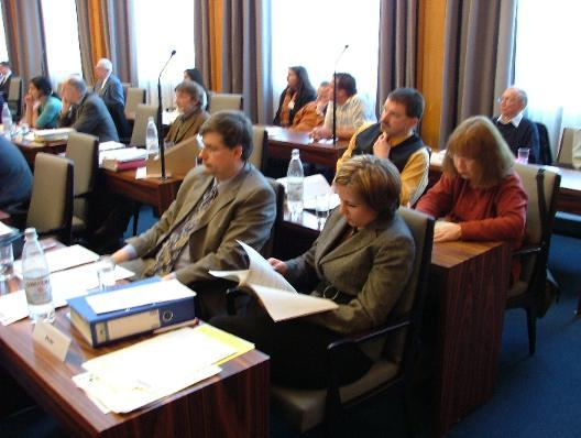 Pro Köln-Fraktion im Kölner Stadtrat: Manfred Rouhs, Judith Wolter, Bernd M. Schöppe, Regina Wilden und Hans-Martin Breninek (von links vorne nach hinten)